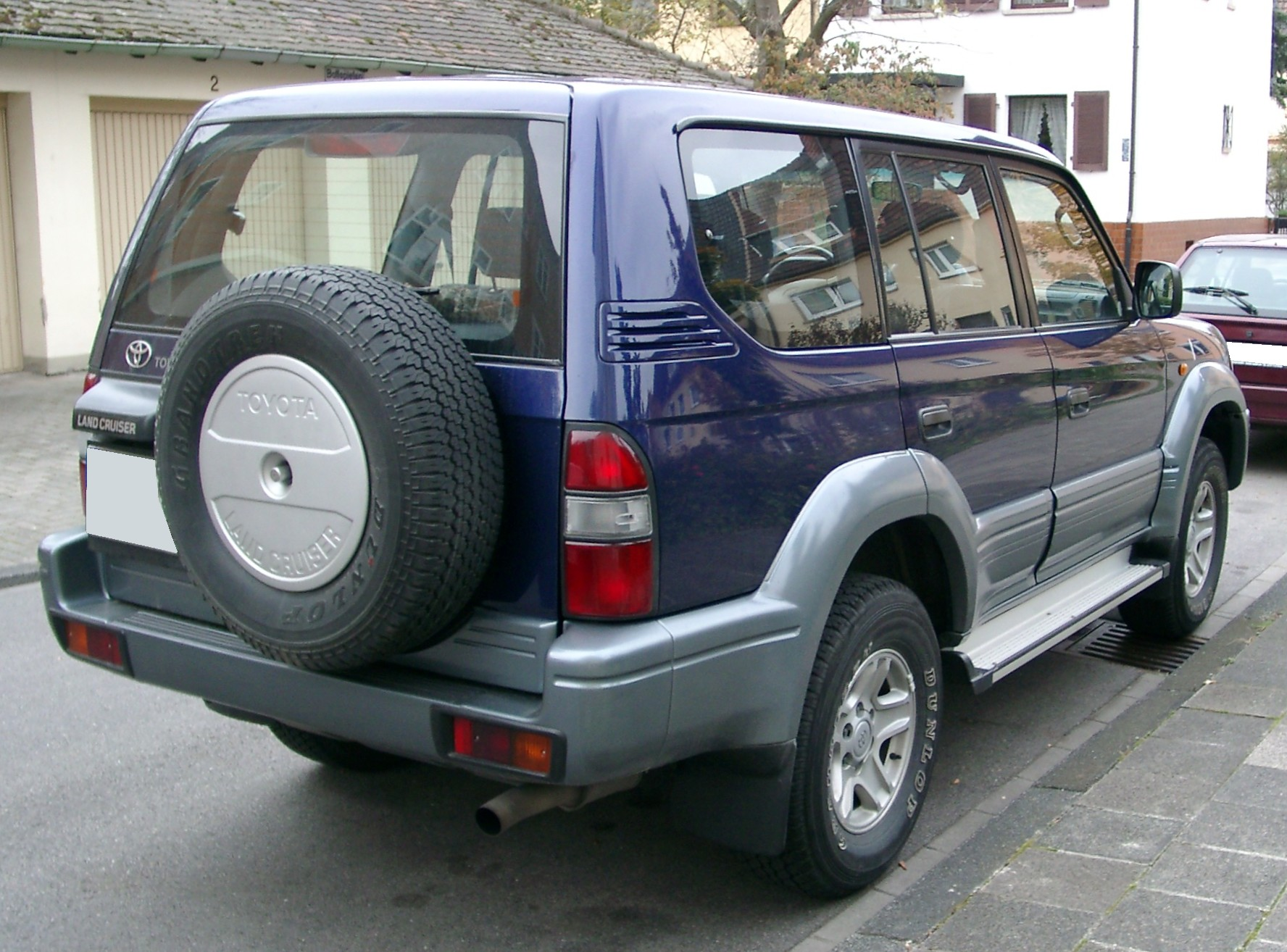 Toyota Land Cruiser